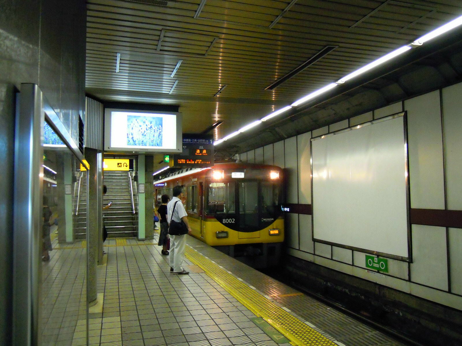 Keihan Kitahama station platform